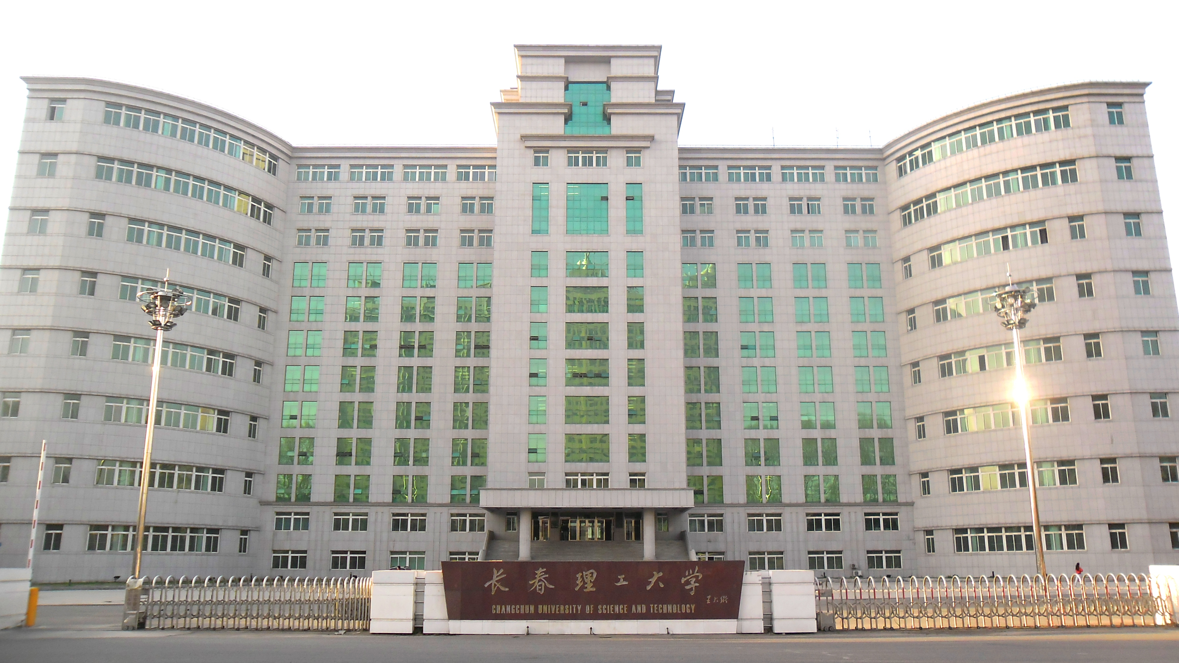 中文（中国大陆）: 长春理工大学西校区